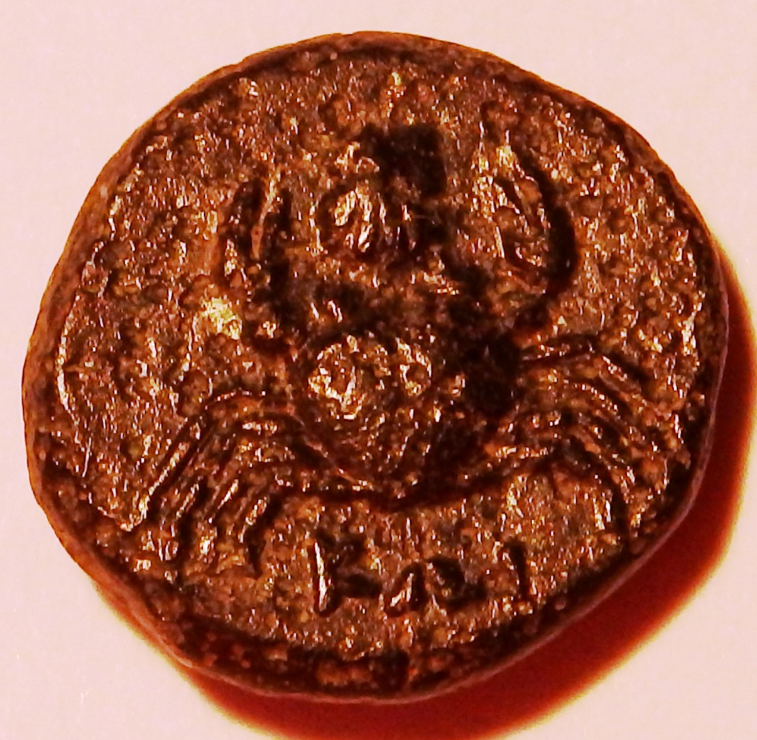 Bronzemünze von Kos, ca. 350 - 300 v. Chr., ca. 9 mm, Szaivert/Sear Nr. 4995, BMC 25